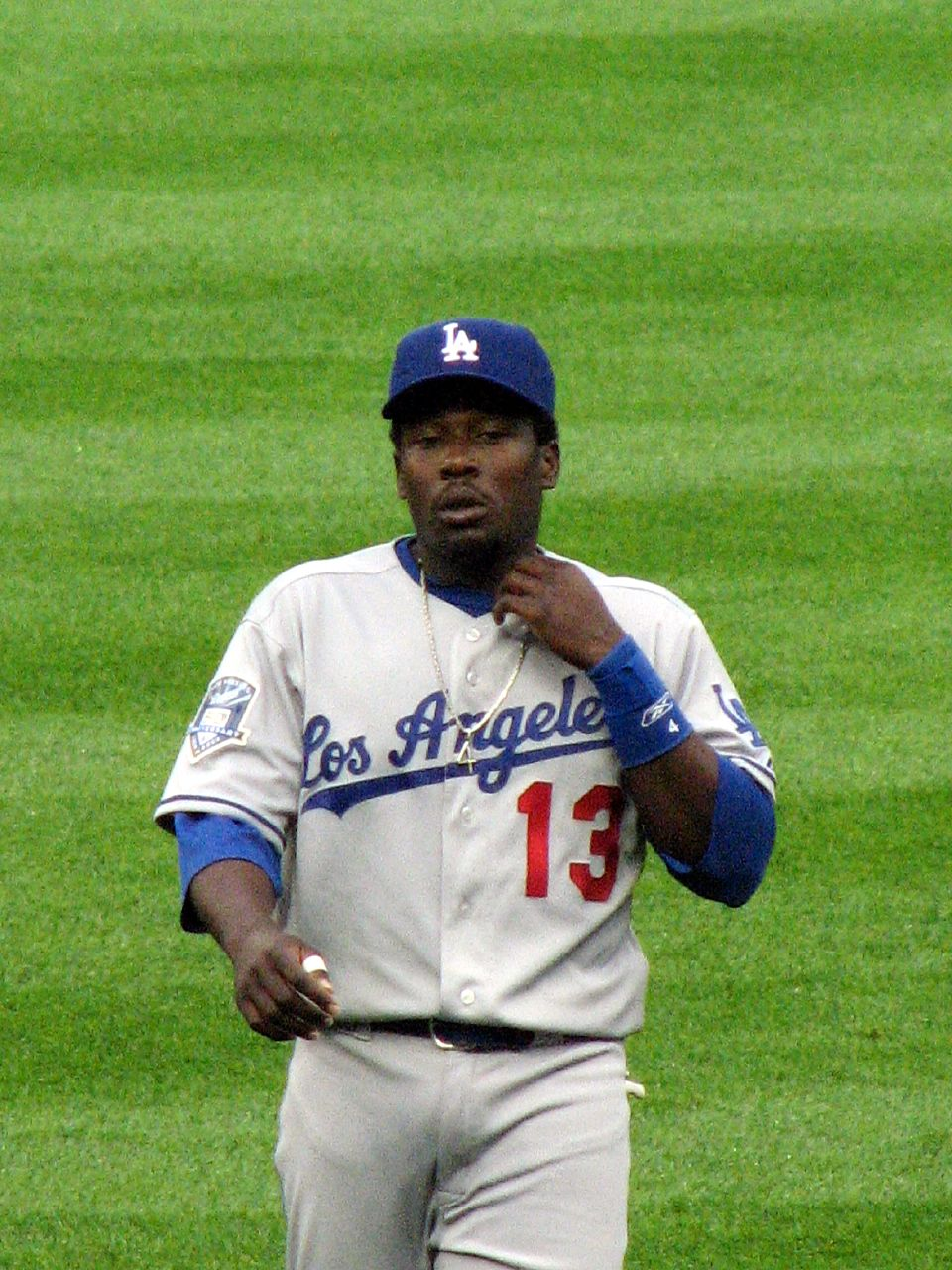 Ángel Berroa